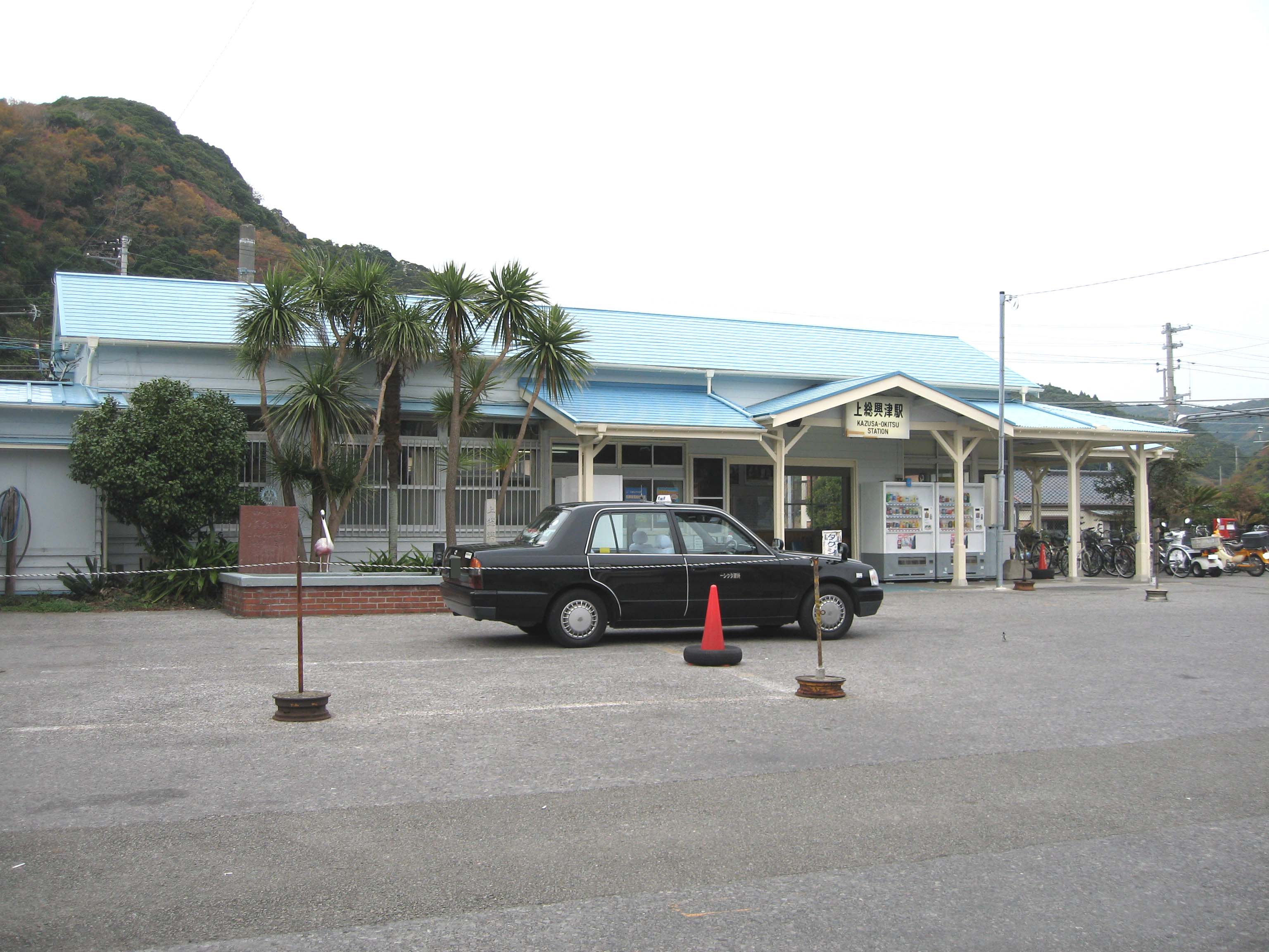 Kazusaokitsu station, Sotobo Line, Chiba, Japan, 上総興津駅駅舎